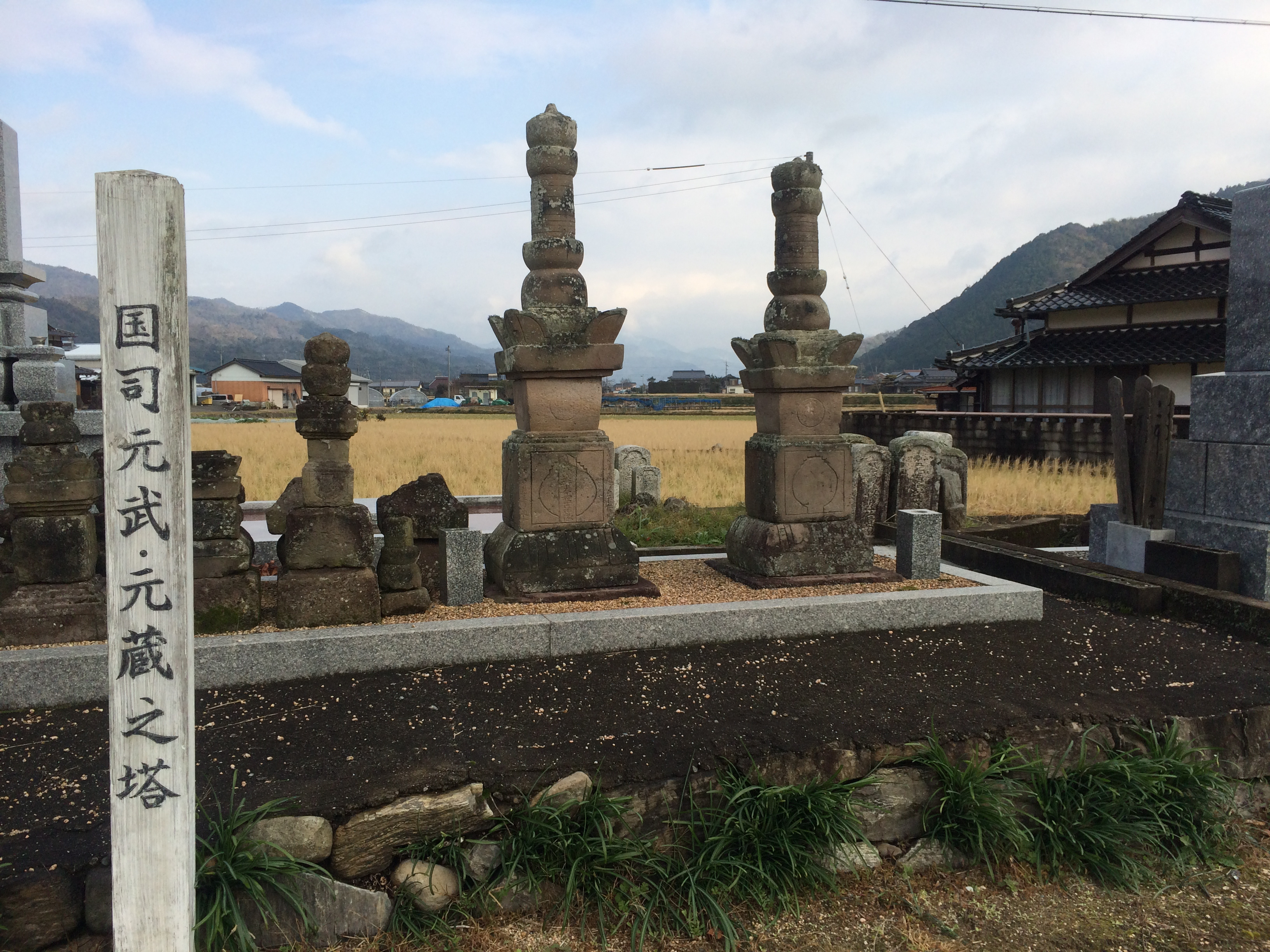 徳地西方寺跡にある毛利家臣の国司元武・元蔵の墓碑（山口市）